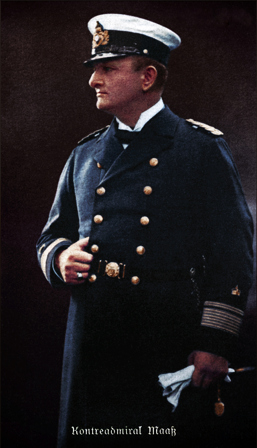 El contralmirante alemán Leberecht Maass (1863-1914)